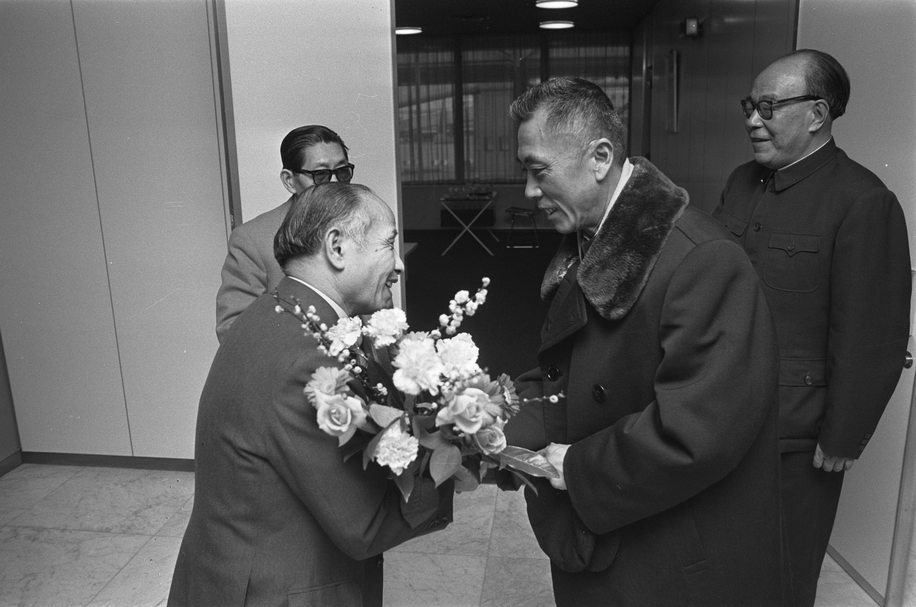 Collectie / Archief : Fotocollectie Anefo Reportage / Serie : [ onbekend ] Beschrijving : Chinese Minister van Buitenlandse Handel Pai Hsiang Kuo op Schiphol, Minister Pai Hsiang Kuo (tweede van rechts) krijgt bloemen aangeboden door Chinese zakenman Datum : 18 januari 1973 Trefwoorden : BLOEMEN, ZAKENLIEDEN, aanbiedingen, ministers, vliegvelden Fotograaf : Verhoeff, Bert / Anefo Auteursrechthebbende : Nationaal Archief Materiaalsoort : Negatief (zwart/wit) Nummer archiefinventaris : bekijk toegang 2.24.01.05 Bestanddeelnummer : 926-1631